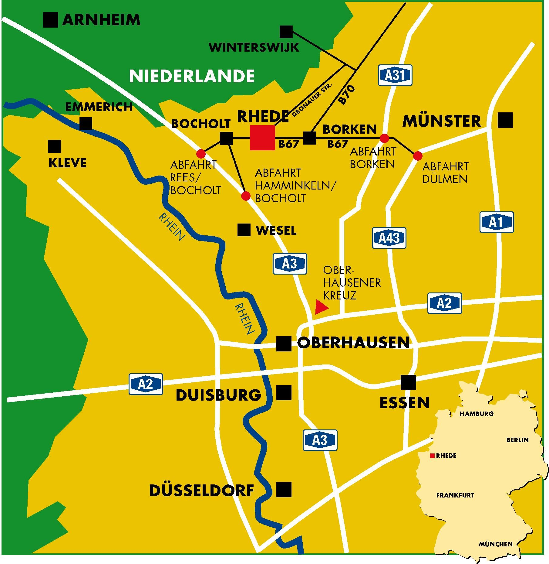 Anfahrtsskizze Rhede